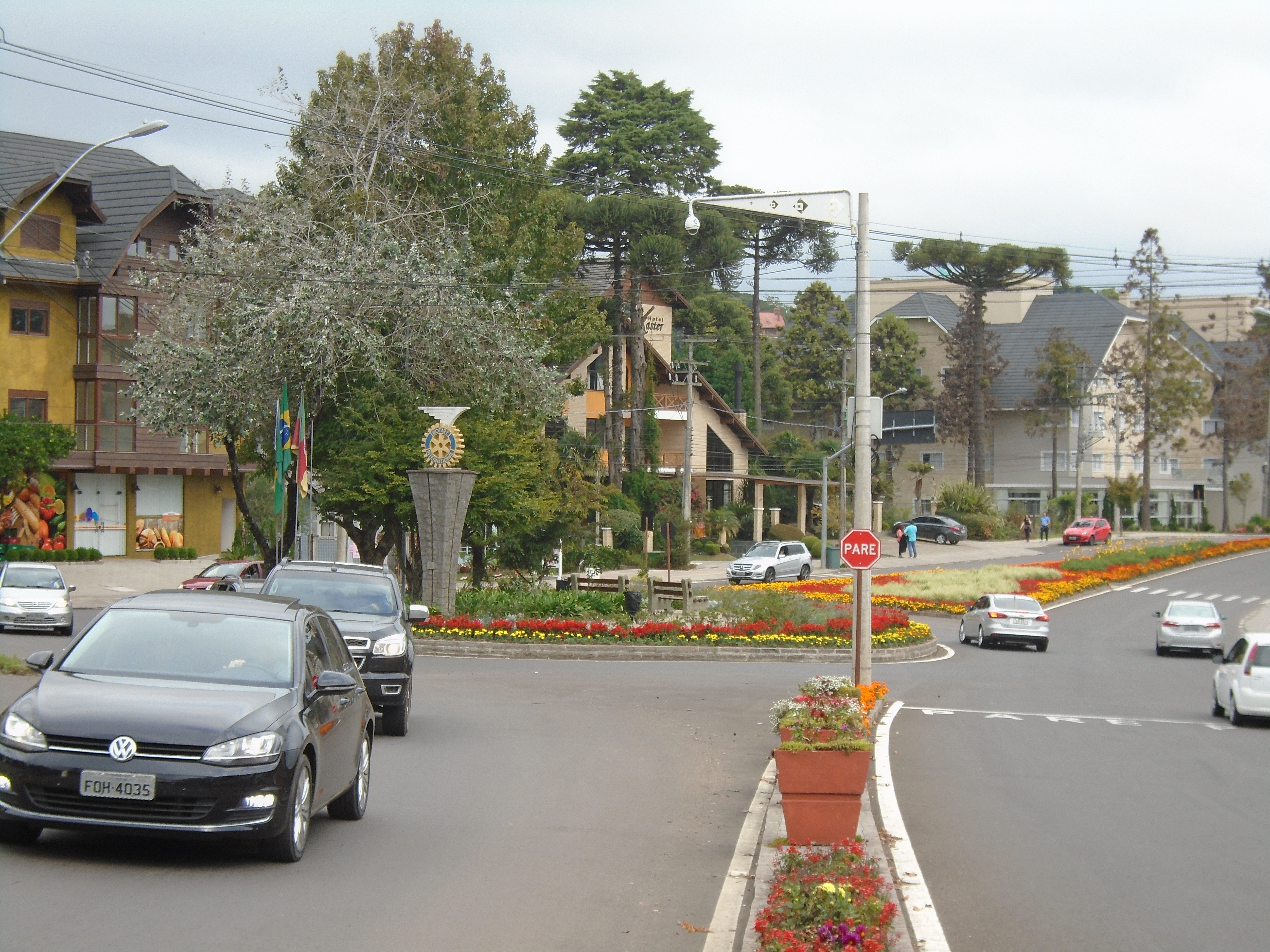 Praça do Rotary (Gramado, Brasil)